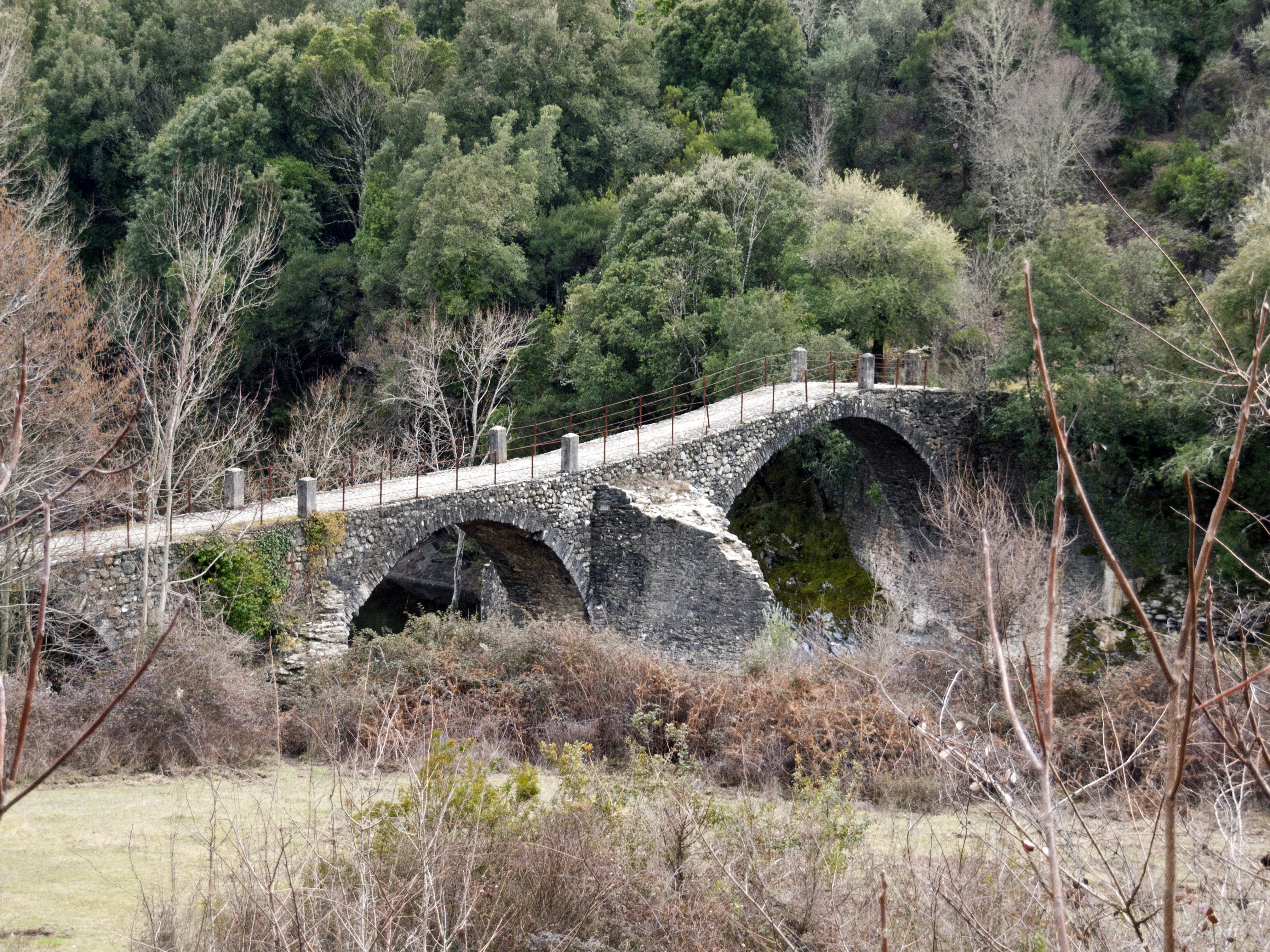 Piedicorte-di-Gaggio, Rogna (Corse) - Pont Laricio sur le Tavignano, au lieu-dit Sortipiani